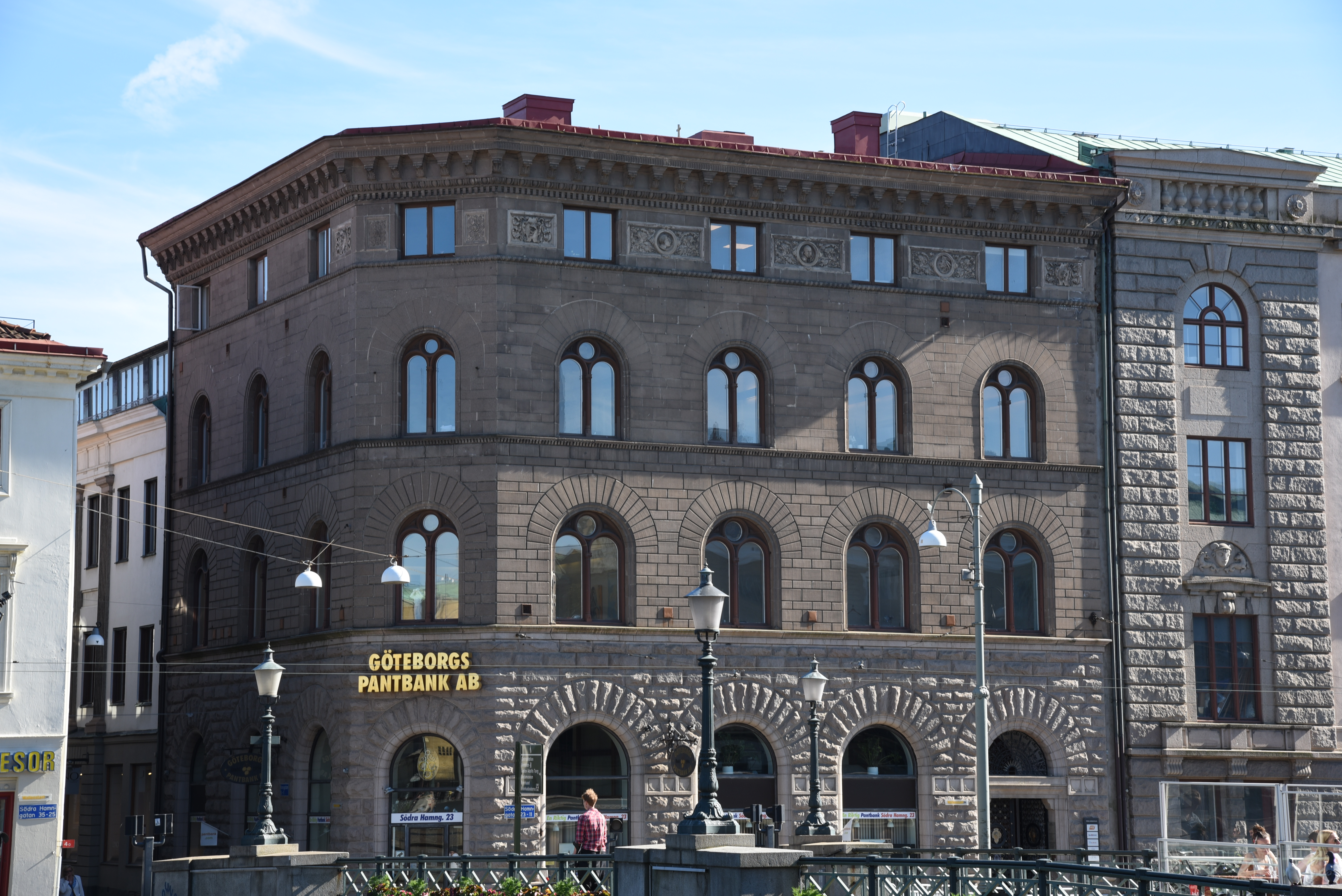 Korsgatan 1 - Södra Hamngatan 23 i kvarteret Kommerserådet i stadsdelen Inom Vallgraven i Göteborg.Byggnaden uppfördes år 1891 för Göteborgs Köpmansbank efter ritningar av K Johansson.